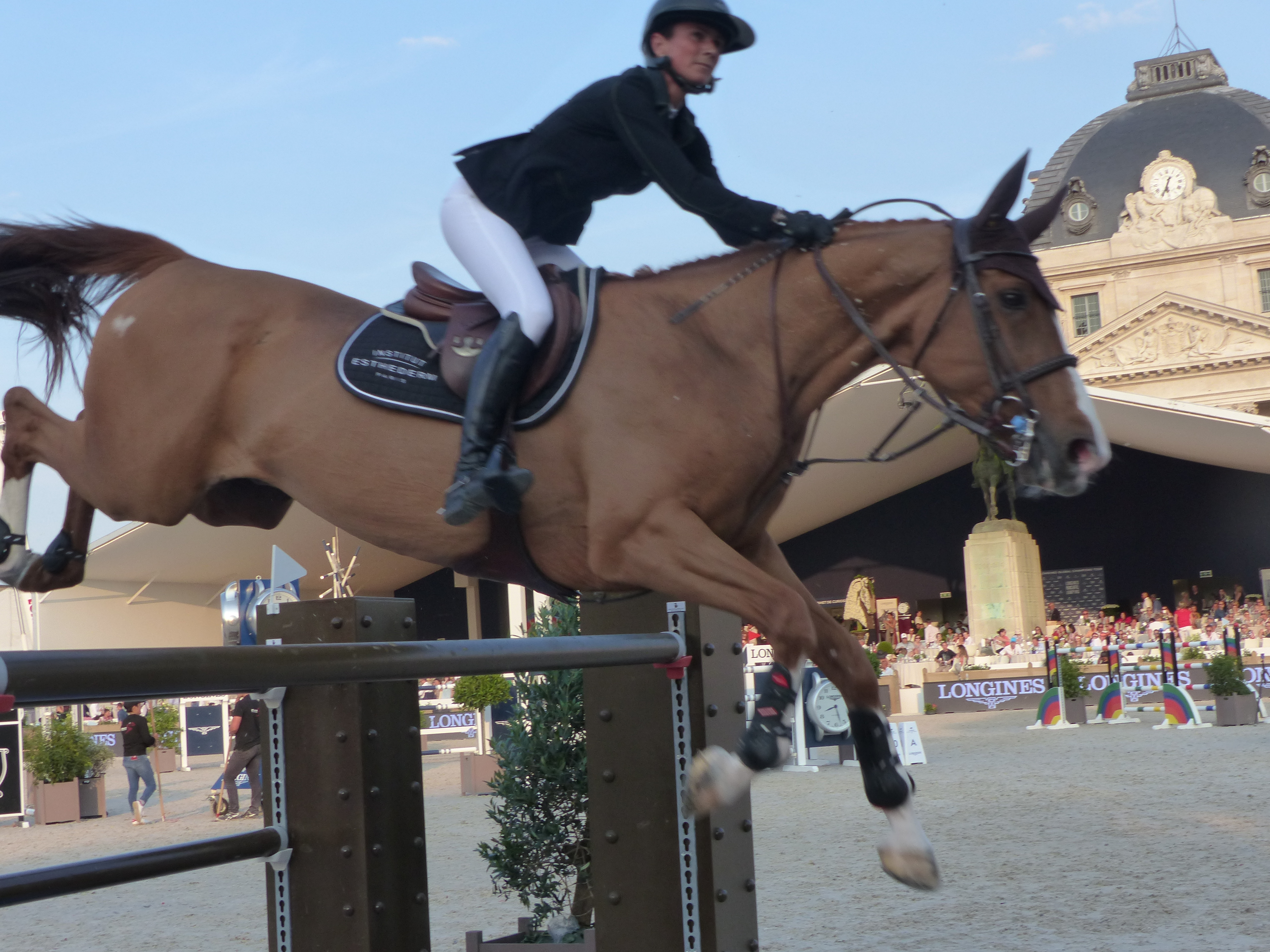 La cavalière française Pénélope Leprévost montant Gain Line lors du Global Champion Tour - Paris Eiffel Jumping